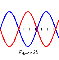 Description: Deux sinus en opposition de phase Source: Laza_82 Licence: GFDL